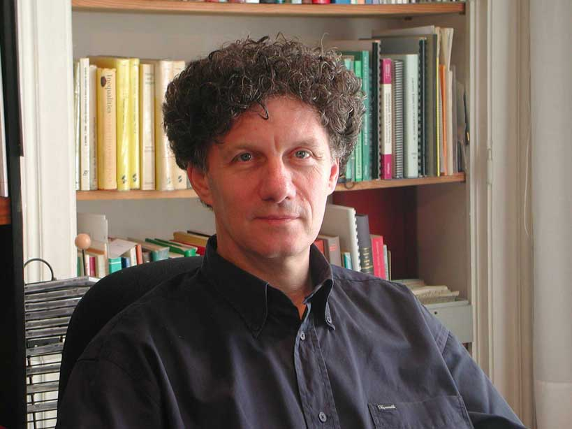 Gérald Tenenbaum est un mathématicien et romancier français